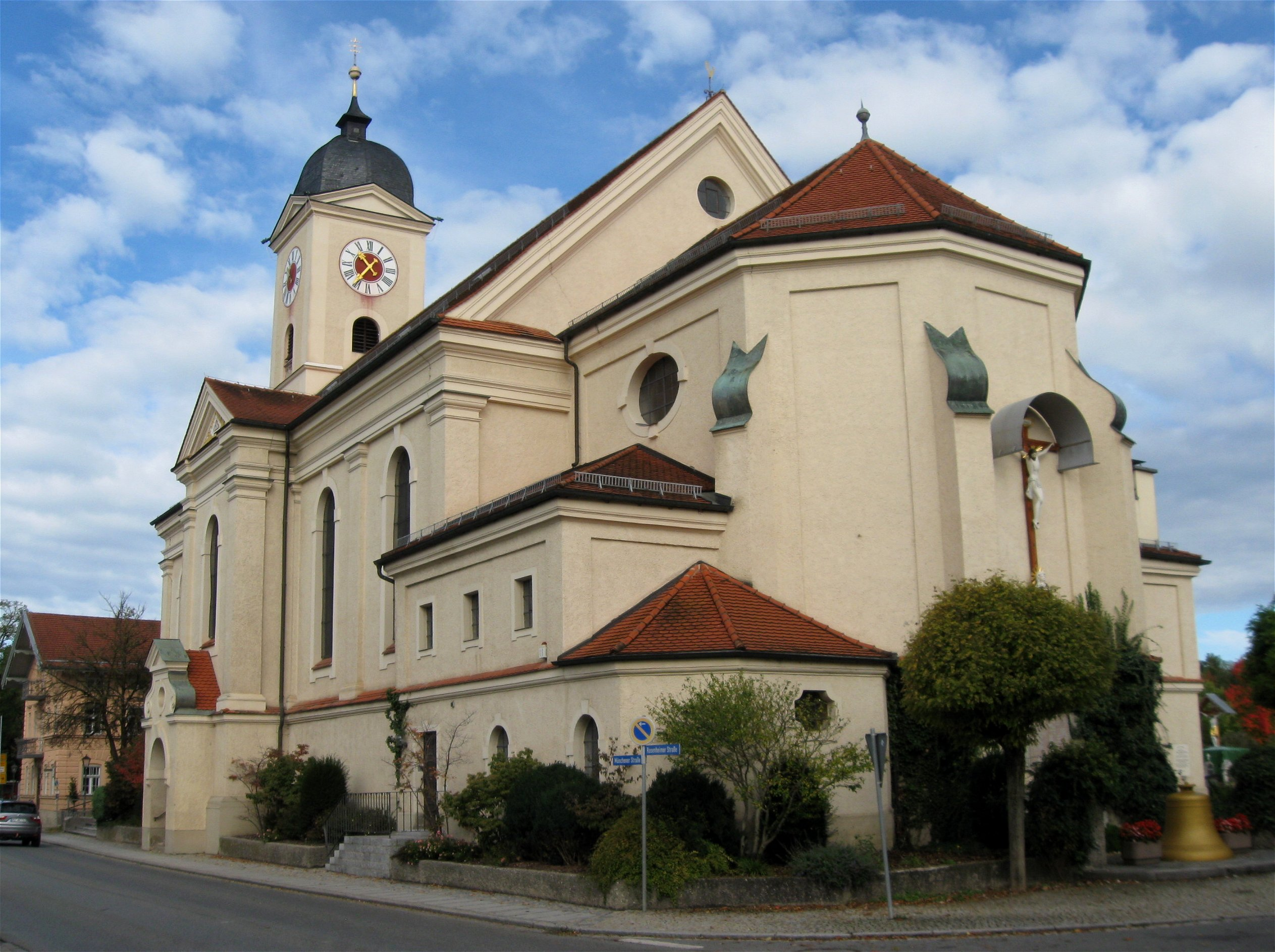 Münchener Straße 2; Grieblweg 5; Katholische Pfarrkirche St. Laurentius, Saalbau mit Satteldach und westlichem Turm mit welscher Haube, historisierender Neubau unter Einbeziehung des spätgotischen Turmunterbaus von Hans Schurr, südl. Turmwand bez. 1469, 1906 Neubau; mit Ausstattung; Kriegerdenkmal für die Gefallenen der Mordweihnacht von 1705, des Russlandfeldzugs von 1812, des Krieges 1870/71 und des I. Weltkrieges, Kalksteinrelief, um 1918; Friedhofskapelle, tempelartiger Massivbau mit Flachdach, dreibogigem Arkadengang, Mittelrisalit mit Satteldach und Putzgliederungen, histiorisierend, um 1906.